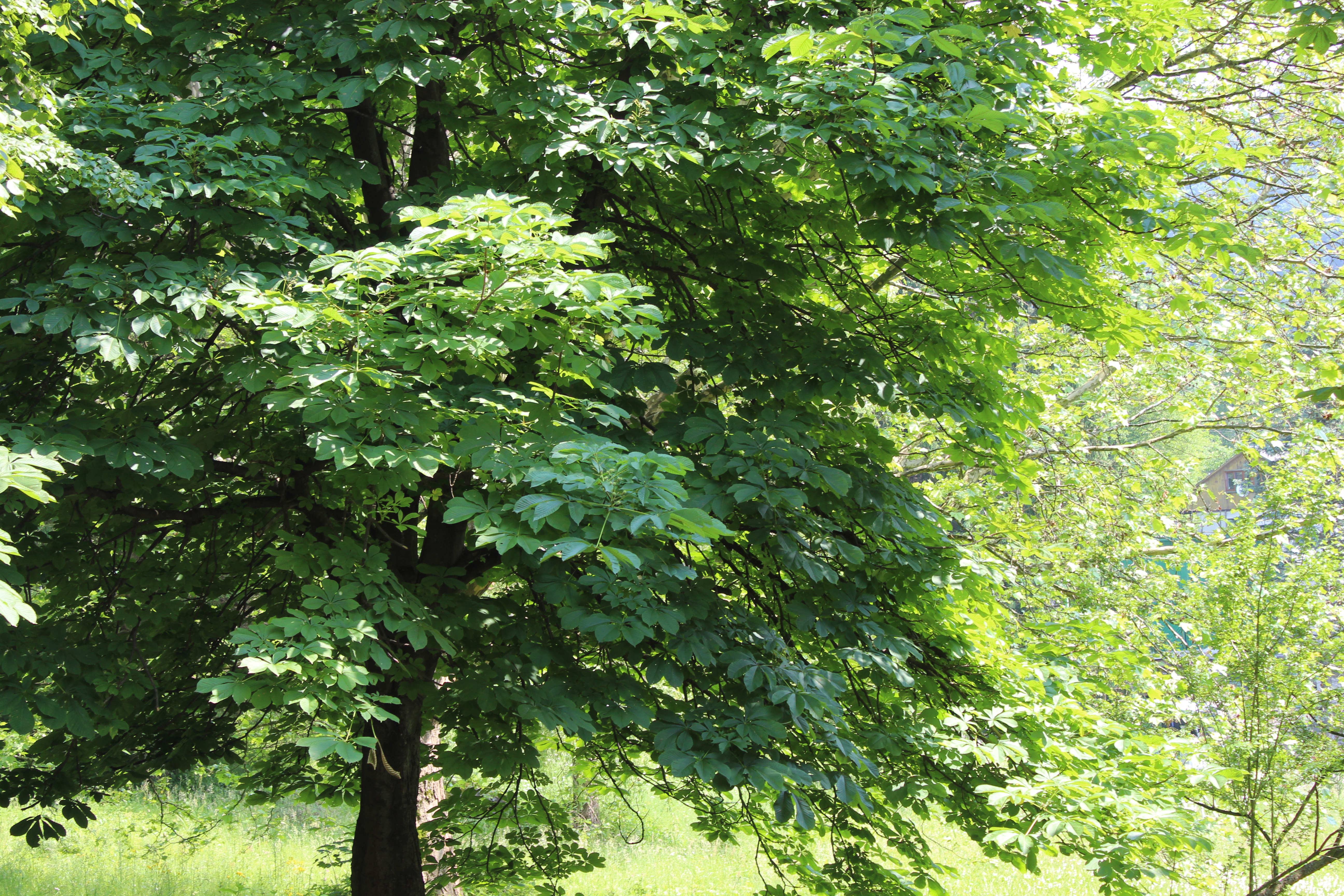 Каштан. Музей екології гір та історії природокористування в Українських Карпатах. Вікіекспедиція